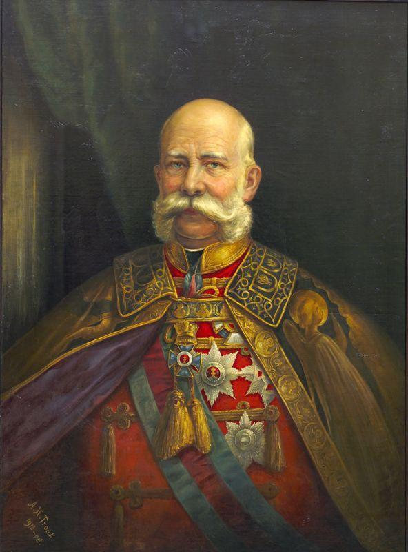 Adell Henri Trouck – Porträt Franz Joseph I – 1913 – Muzeum Śląska Cieszyńskiego w Cieszynie, Polen